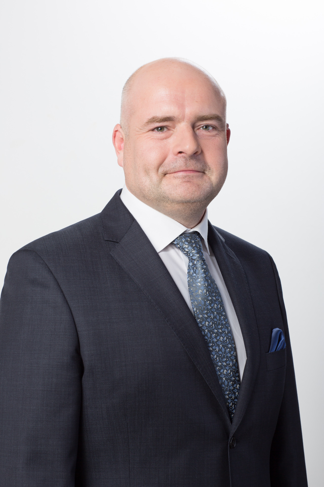 Eesti poliitik Andres Anvelt